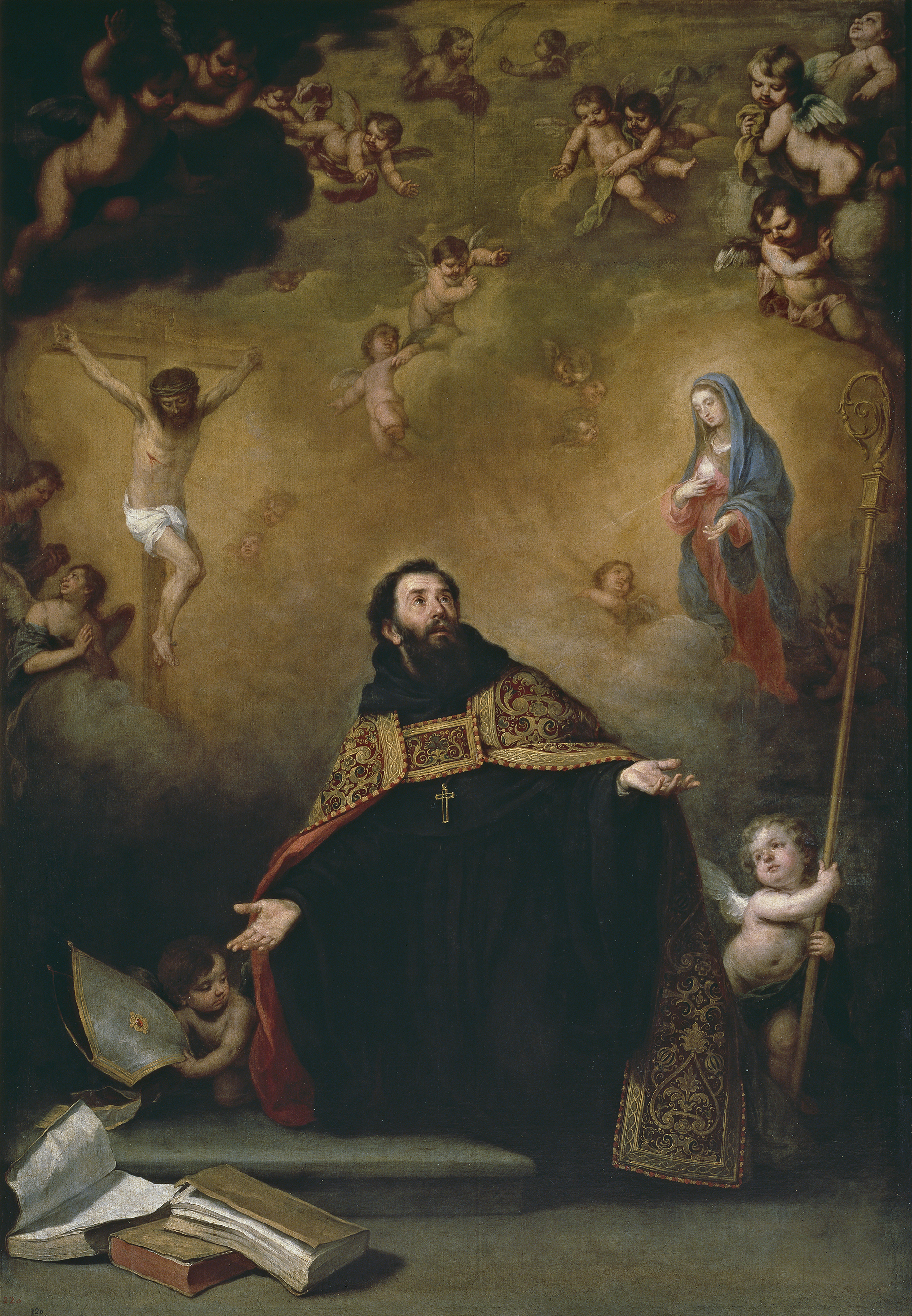 San Agustín de Hipona, uno de los Padres de la Iglesia Católica, aparece arrodillado y vestido de negro, aunque lleva una ostentosa capa pluvial con bordados en oro. El santo aparece entre Cristo crucificado y su madre, la Virgen María.